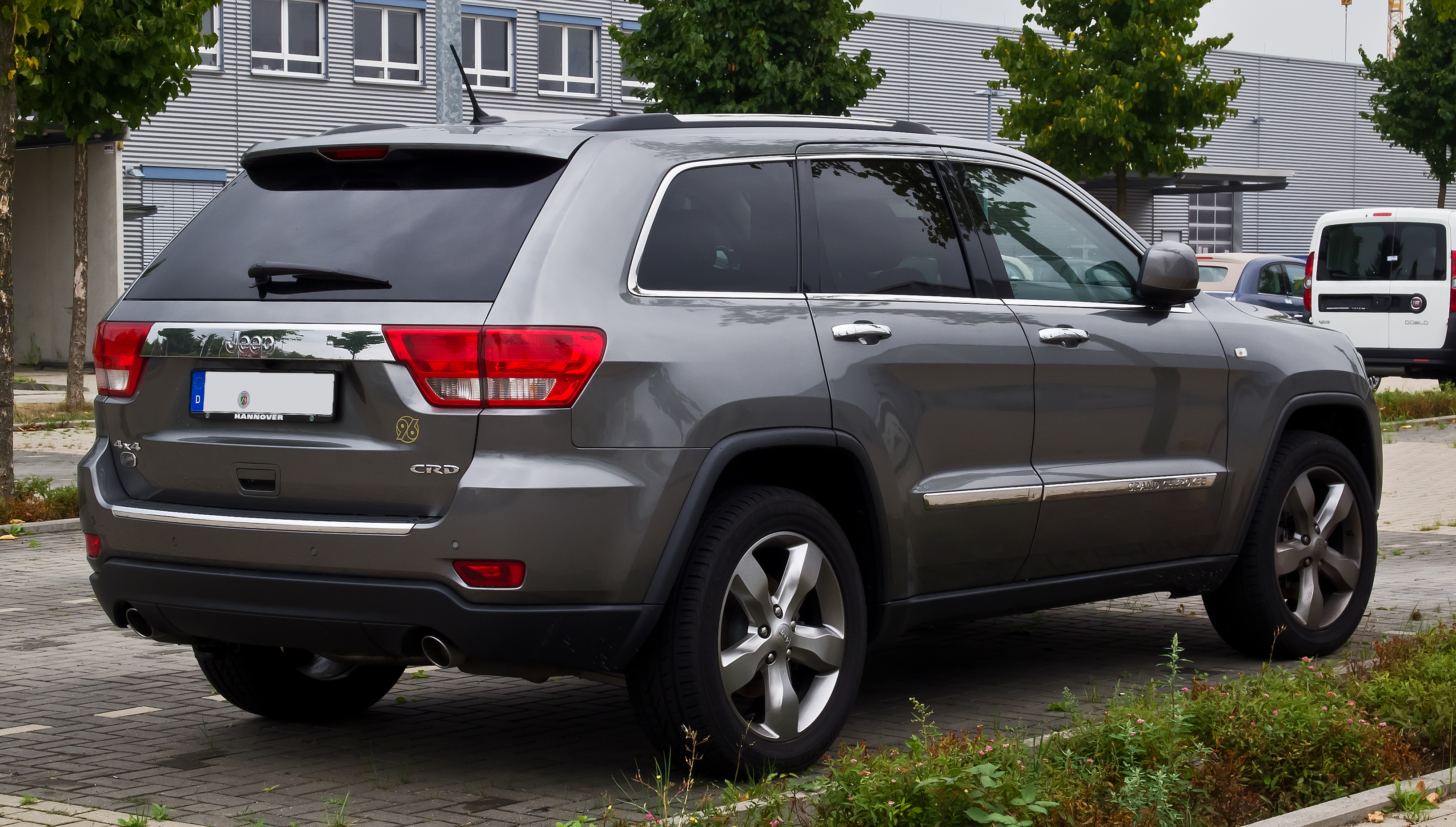 Jeep Grand Cherokee 3.0 CRD Overland (WK)